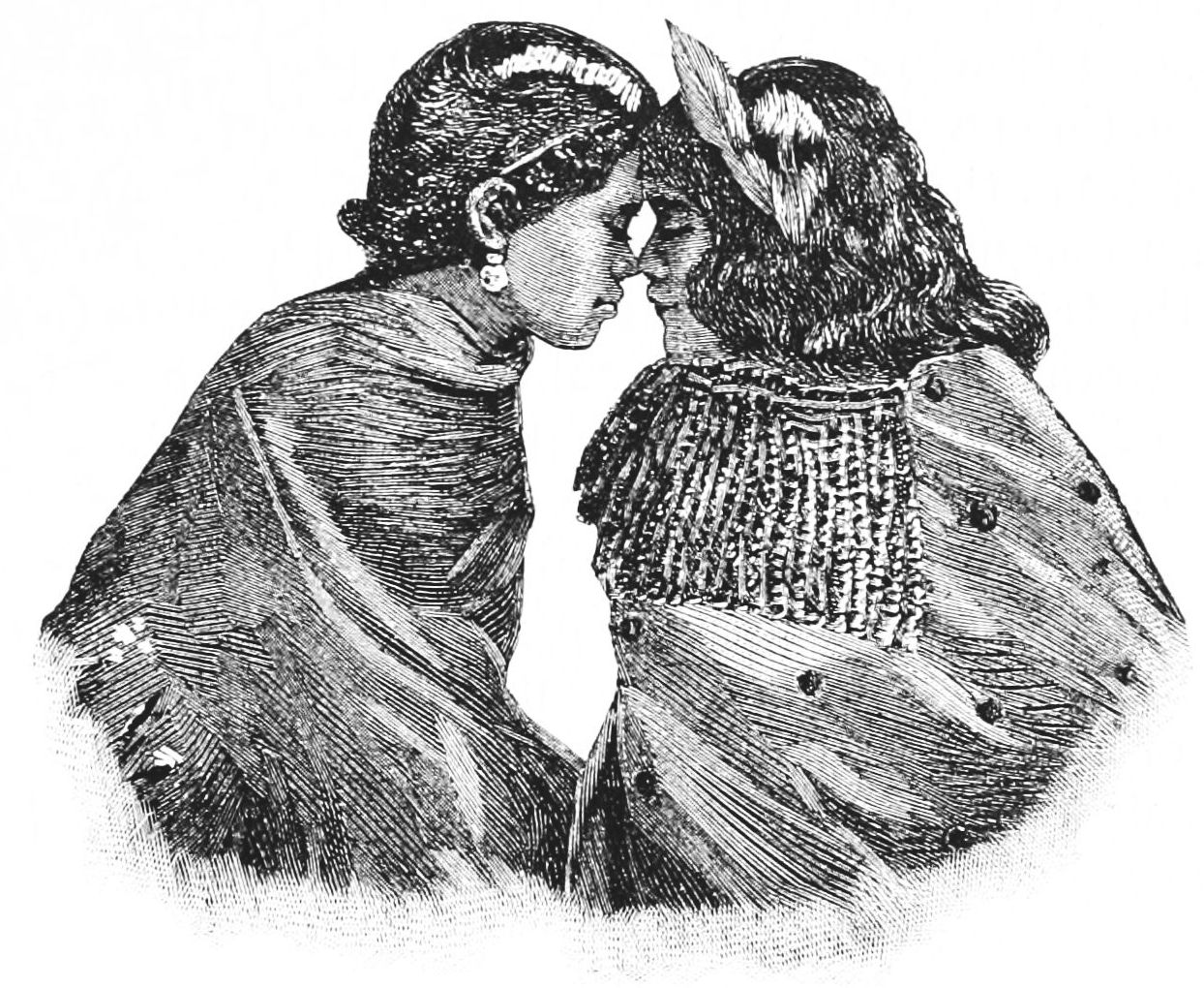 Maori woman